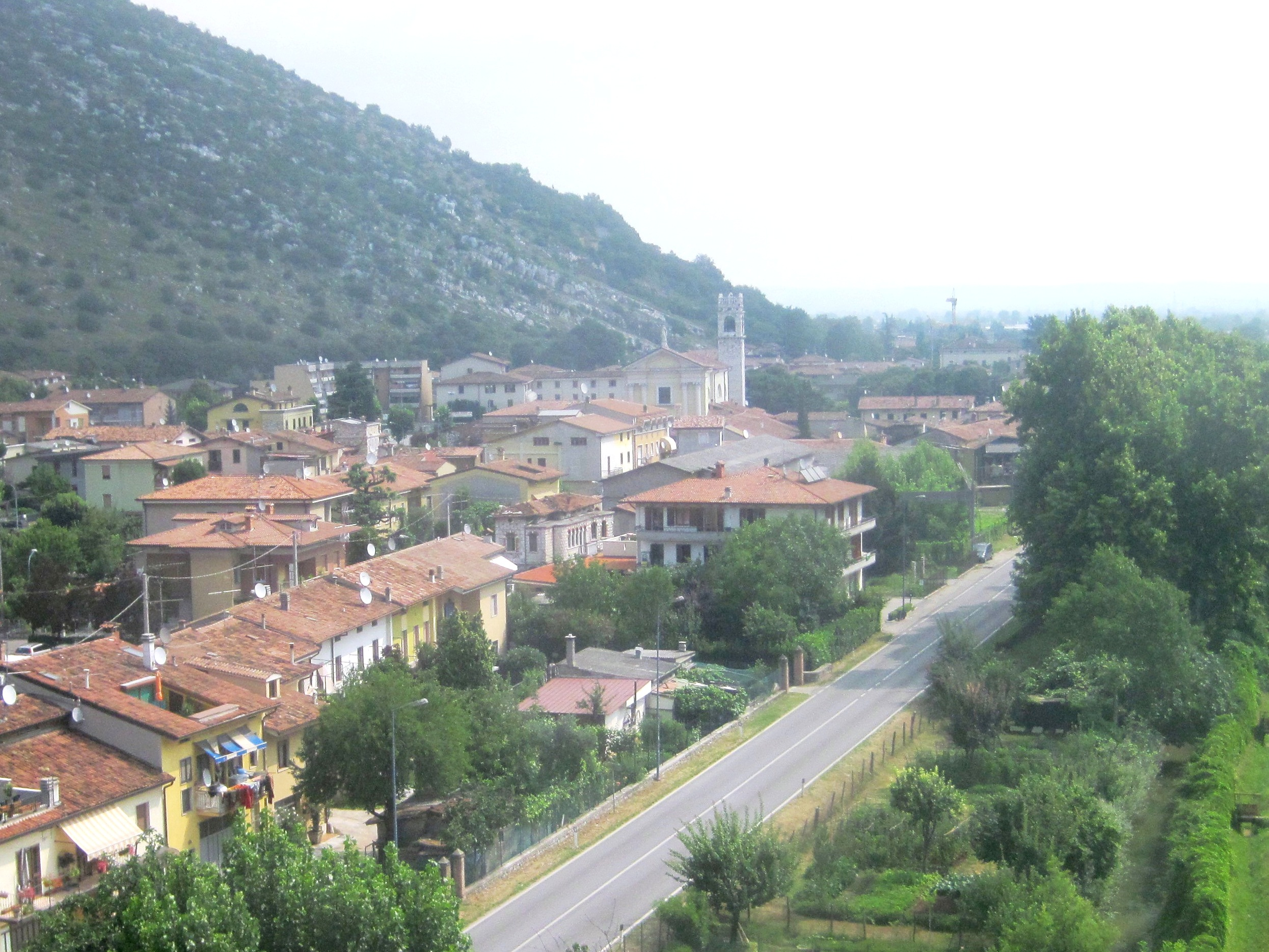 Vista di Mazzano